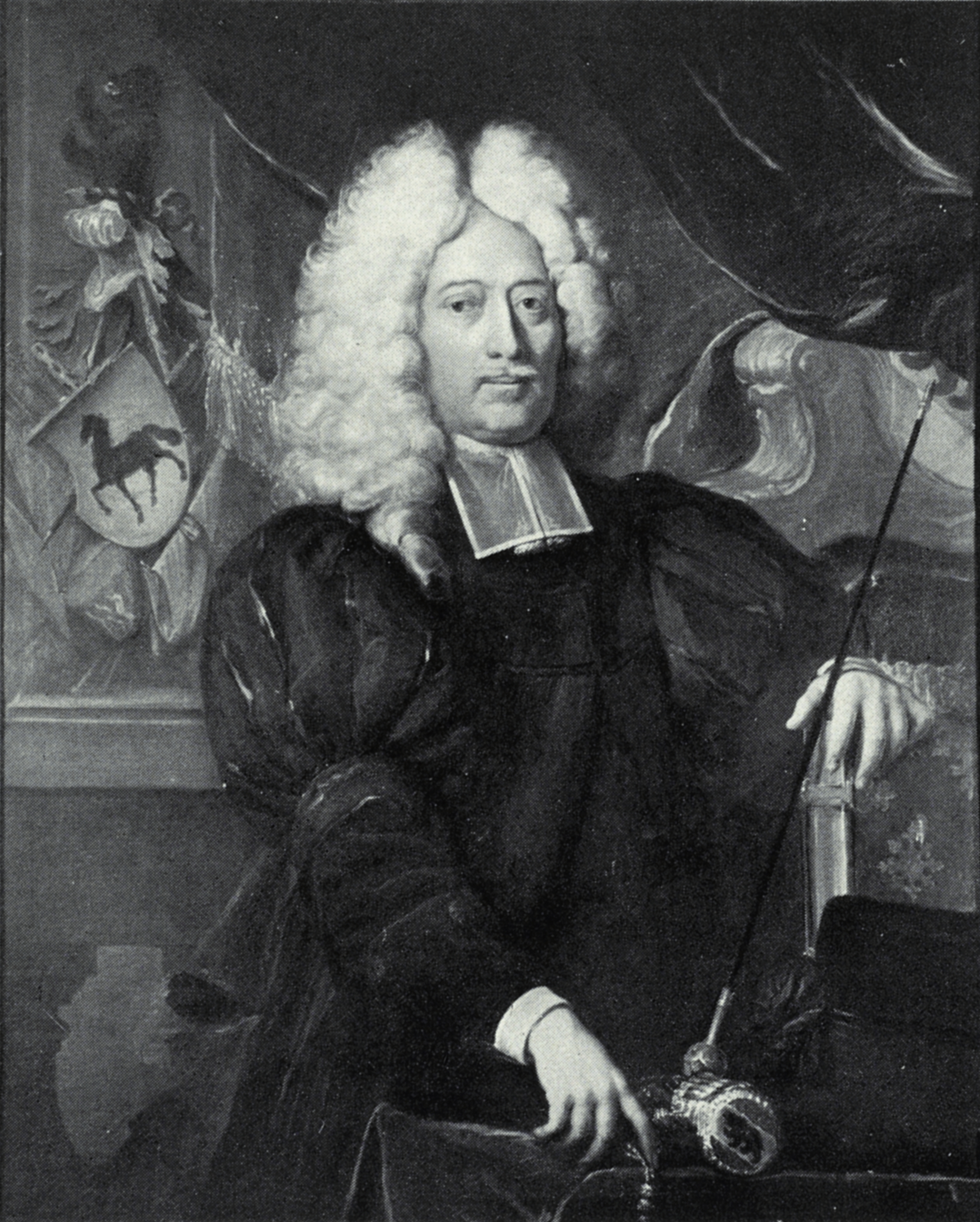 Bildnis Samuel Frisching (II.)